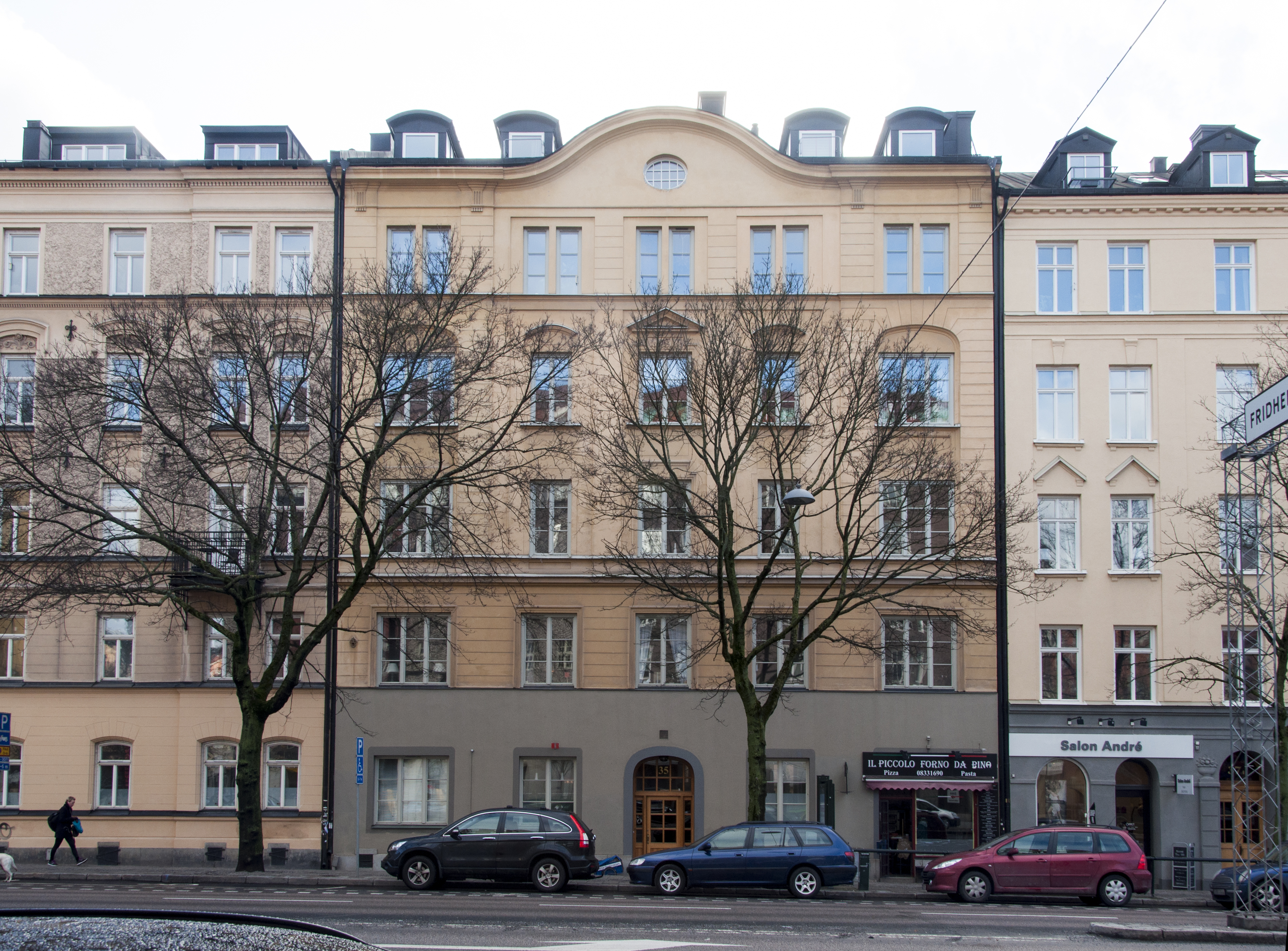 Kamelian 15 Karlbergsvägen 35, Nybyggnadsår 1900 - 1903, Albert Siösteen (Byggmästare) Albert Siösteen (Arkitekt) Anders August Borg (Byggmästare) C Fellenius (Byggherre) J. A. Lindqvist (Byggherre) Johan Arvid Vallin (Arkitekt)